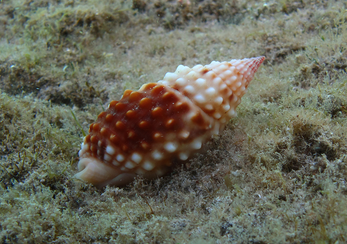 Nassarius (Alectrion) papillosus à la Réunion.